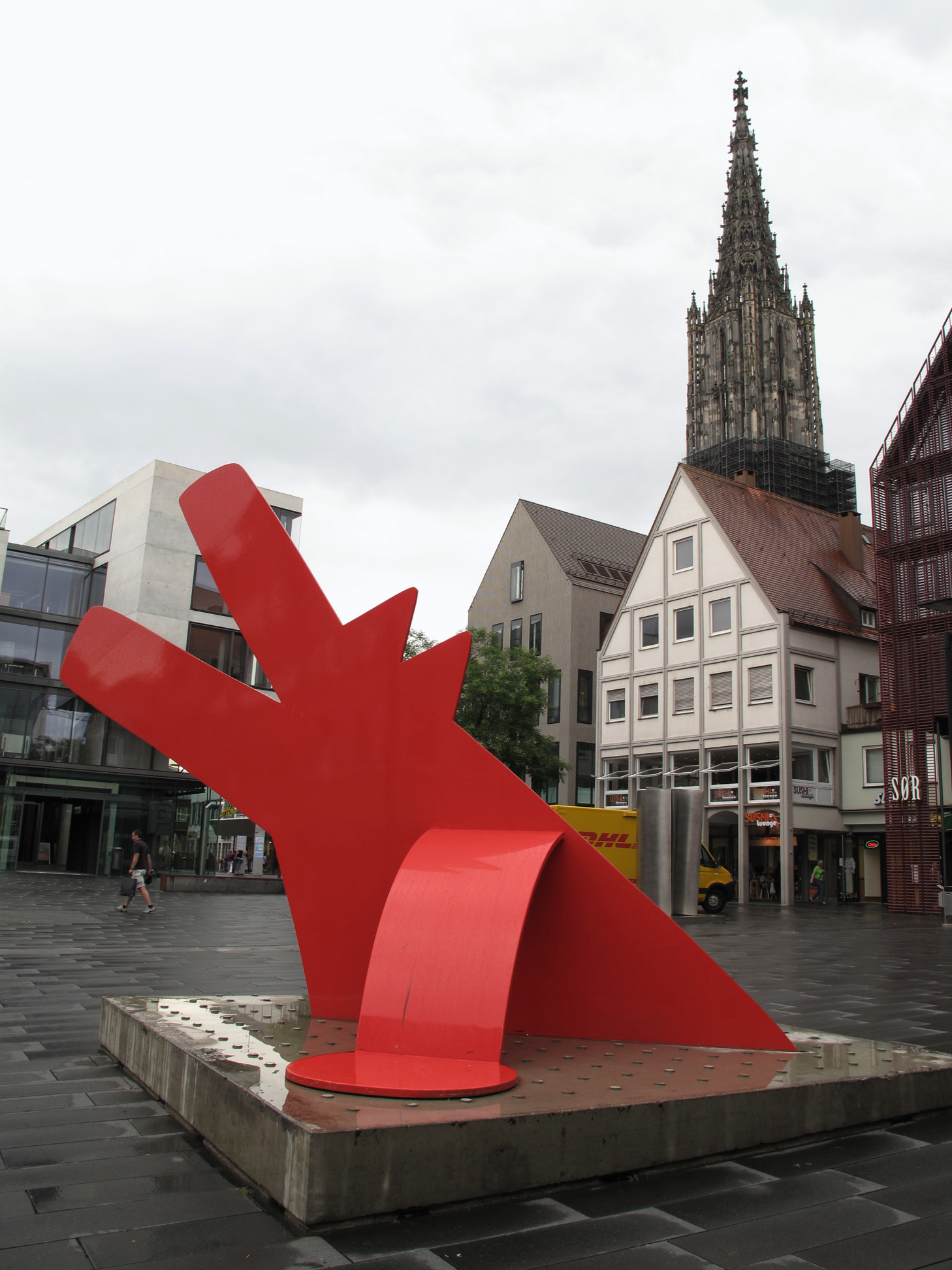 Keith Haring, Red Dog, 1985, vor Kunsthalle Weishaupt / Rathaus / Ulmer Münster, - Ulm, Baden-Württemberg, Deutschland